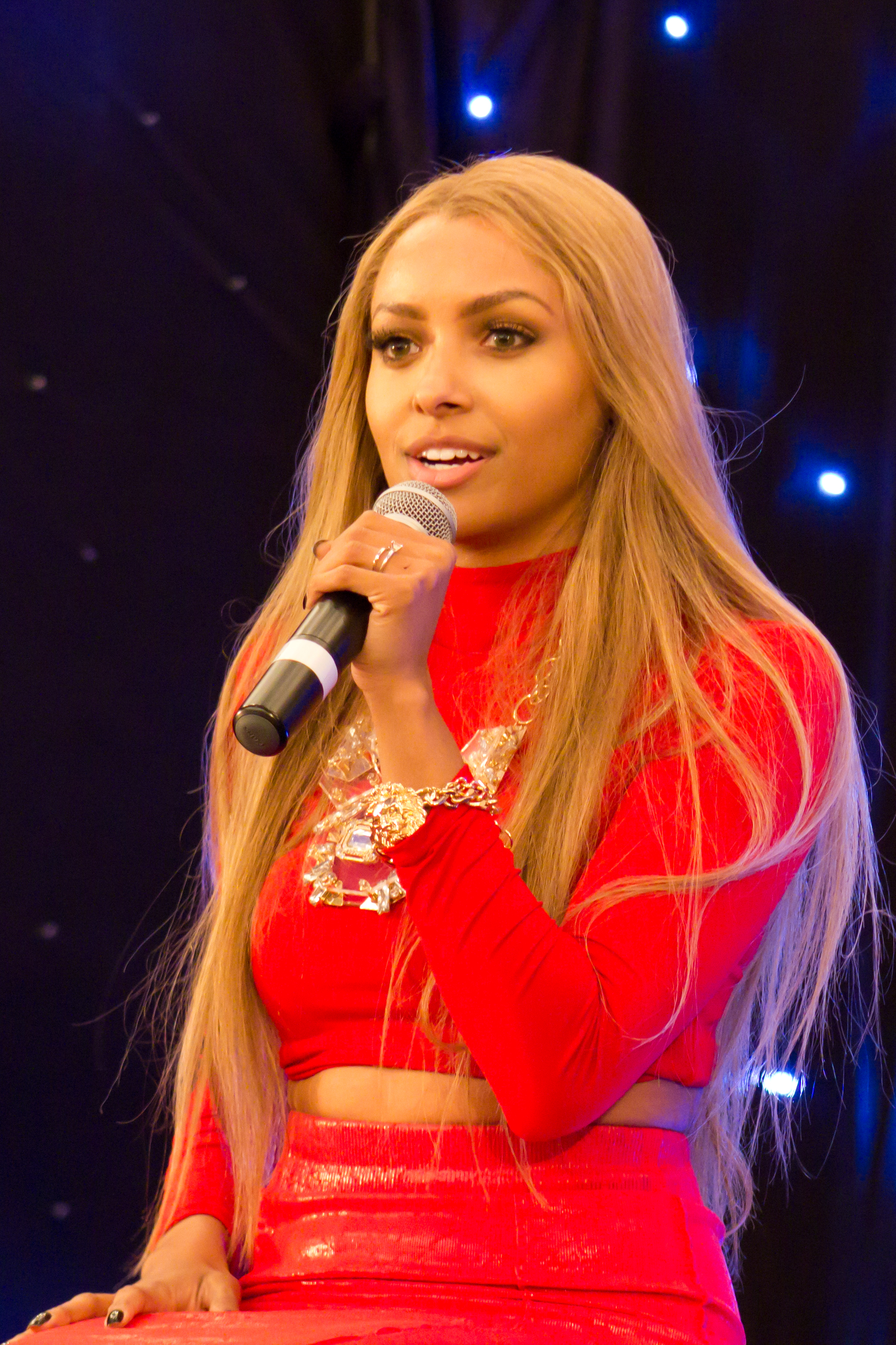 Kat Graham